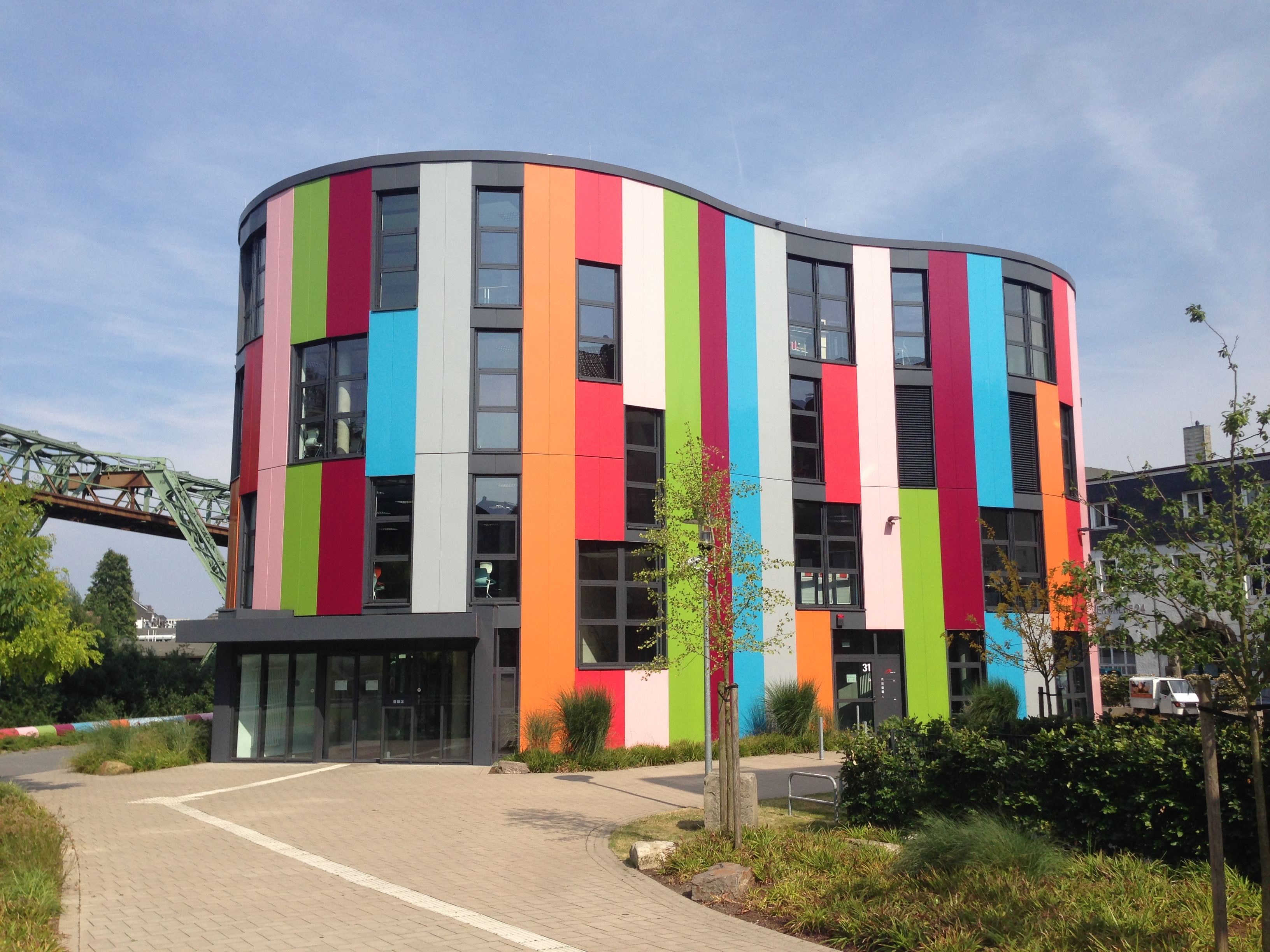 Junioruni in Wuppertal-Unterbarmen